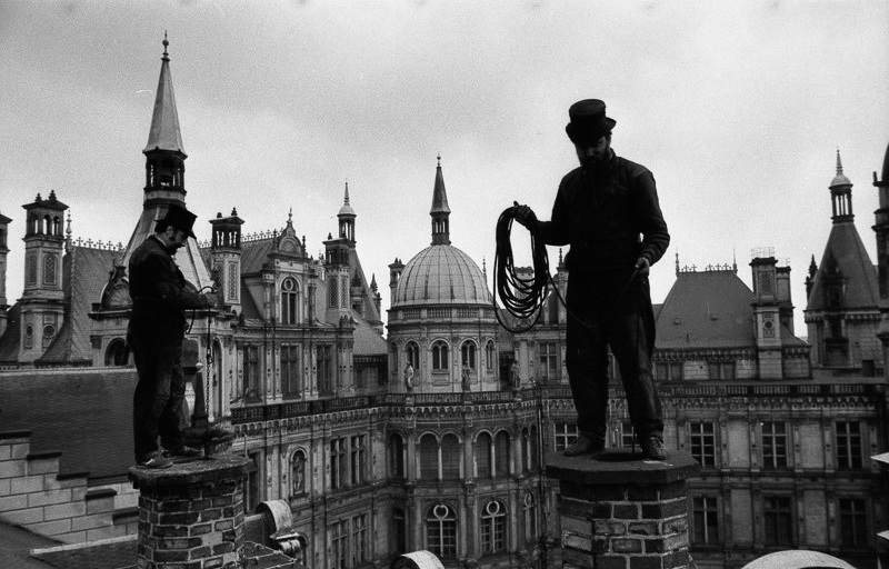 Schwerin, Schornsteinfeger ADN-ZB/Pätzold/1.2.83/Schwerin: Mit besonderer Liebe pflegen die Männer der Schornsteinfegerinnung das schornsteinreichste und kulturhistorisch interessanteste Gebäude ihrer Stadt, das Schweriner Schloß. 365 Türme und Türmchen, von denen viele einst als Kamine dienten und reich verziert sind, geben ihm das einmalige Gepräge.